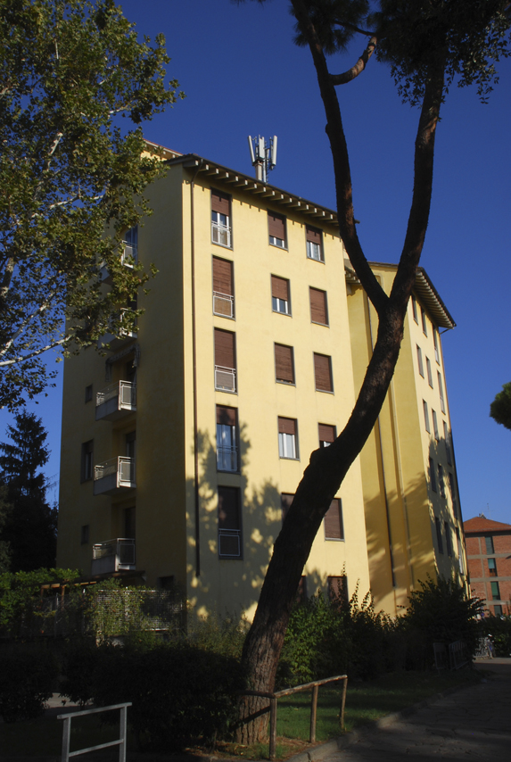 Isolotto (quarter), Florence, Italy. Viale dei Pini: Building.